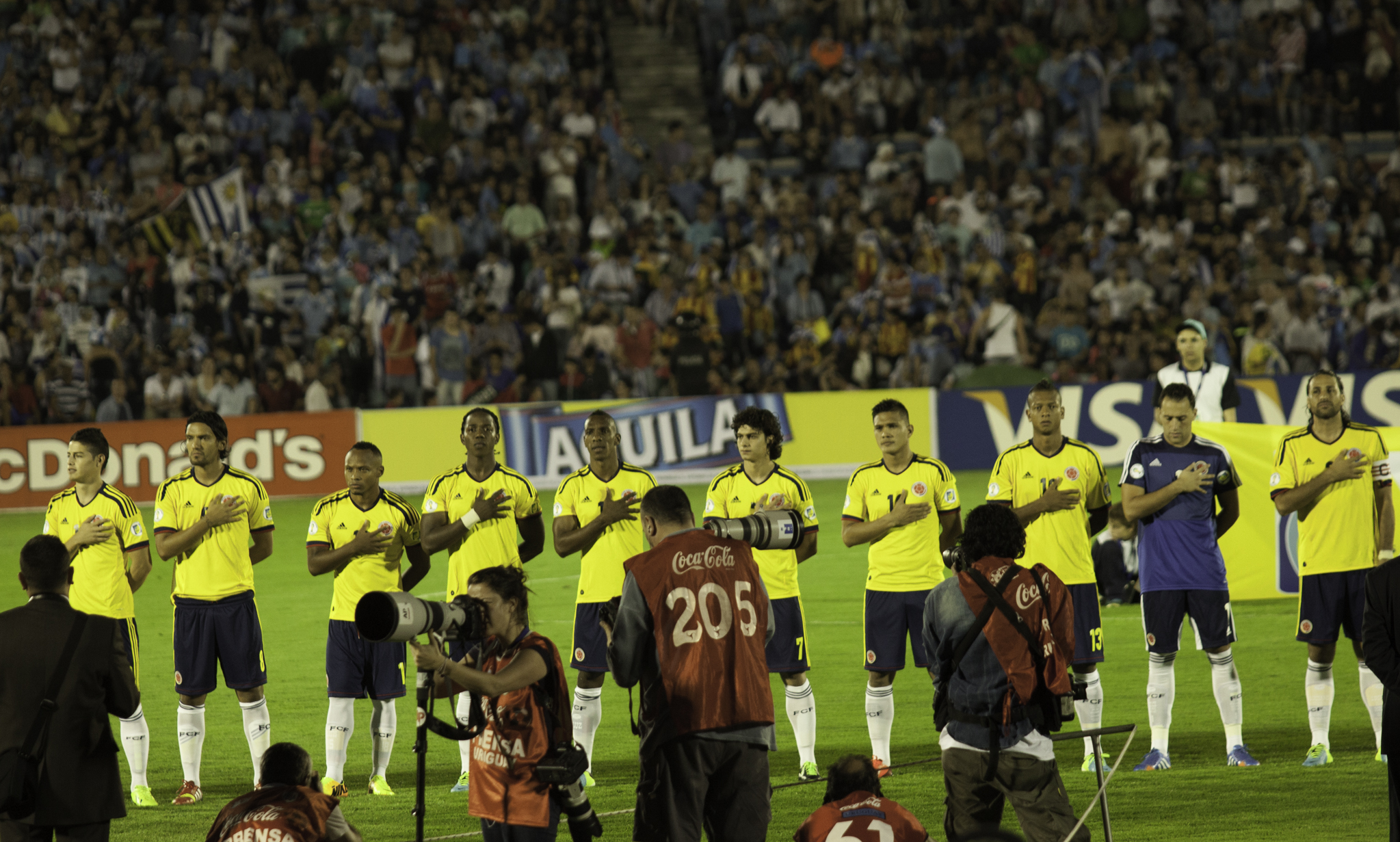 Selección Colombia alineación frente a Uruguay en Montevideo el 10 de septiembre de 2013